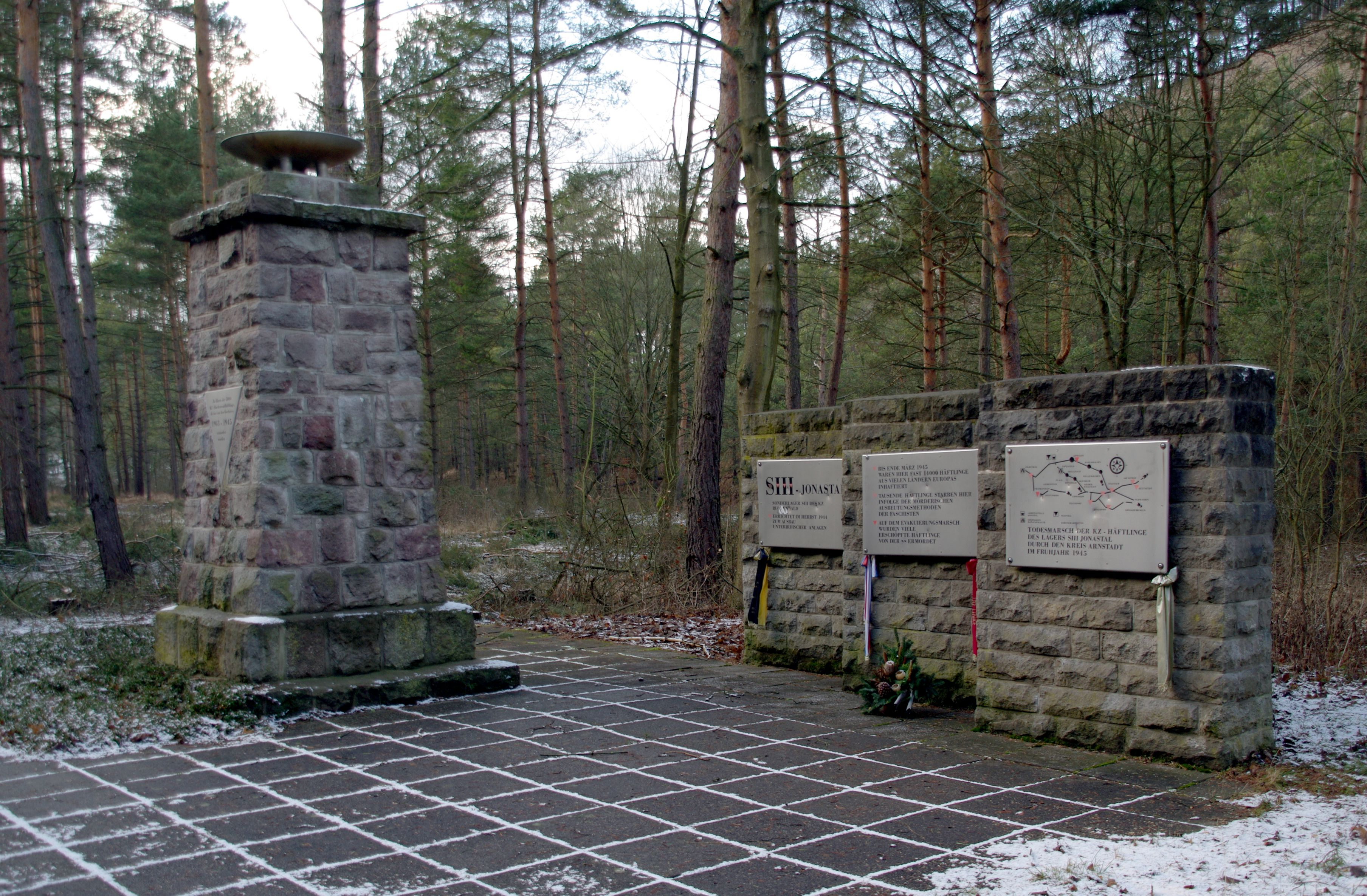 Gedenkstätte im Jonastal